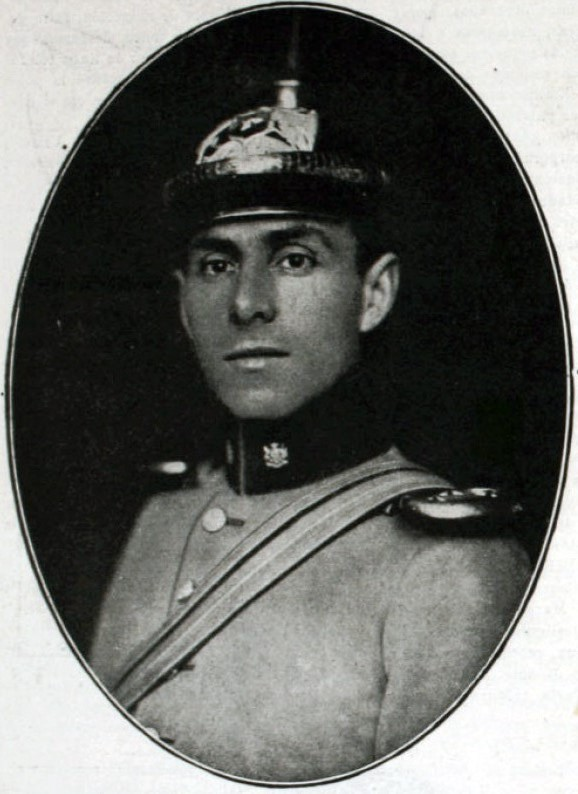 El Capitán Olegario Lazo Baeza (San Fernando, 1878 - Santiago 1964), fue un militar y escritor chileno, miembro de la Academia Chilena de la Lengua.